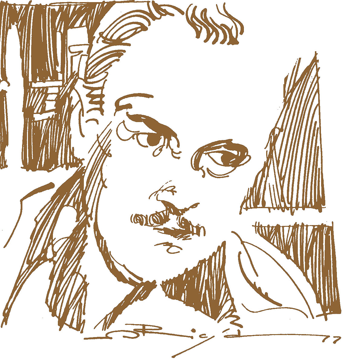 Alex Raymond, in un ritratto a pennino e china di Graziano Origa, 1977